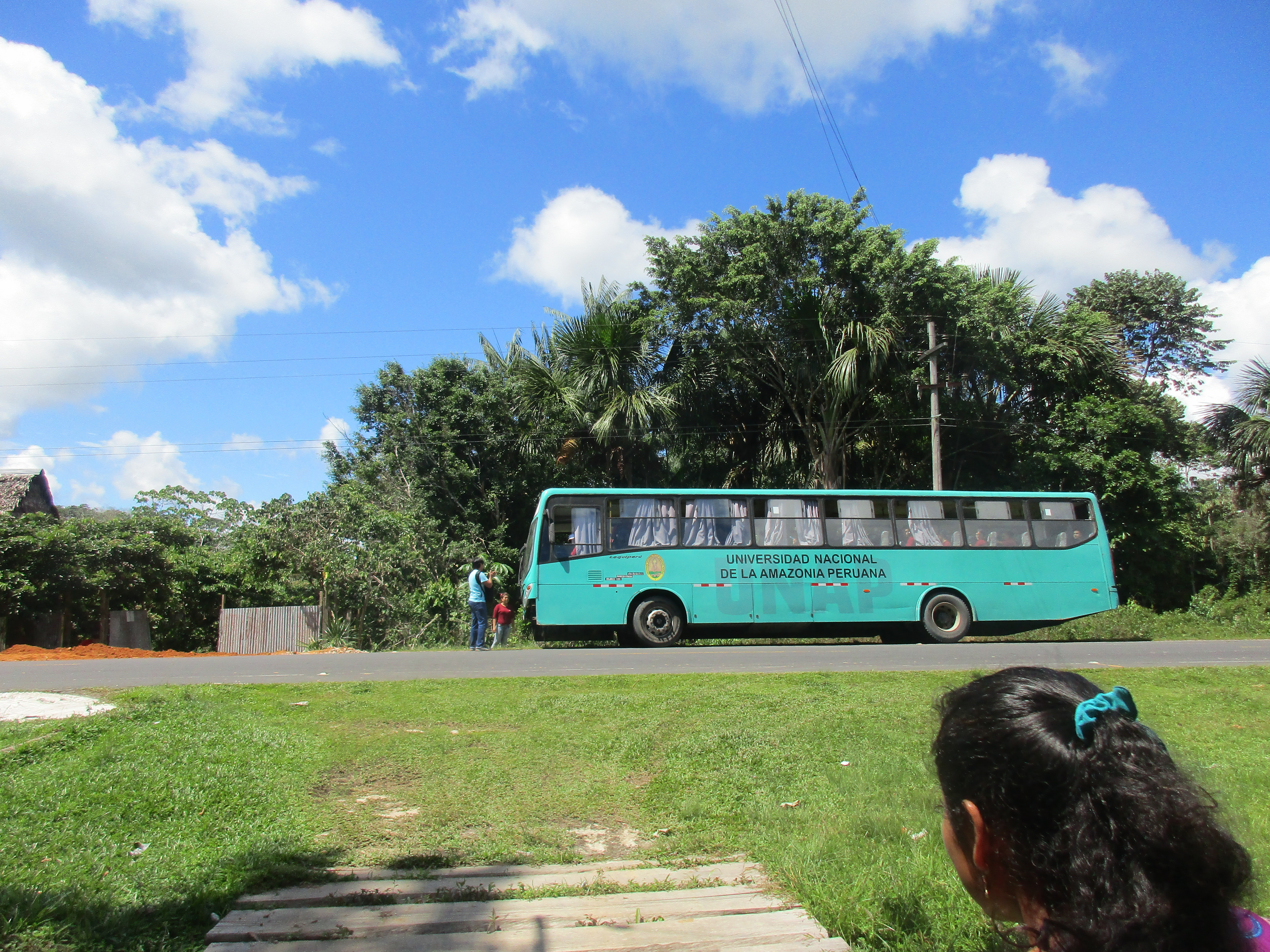 Bus de la Universidad Nacional de la Amazonia Peruana que se encuentra en la Ruta departamental LO-103 (carretera Iquitos-Nauta) brindando transporte pagado a los alumnos de la Universidad Peruana del Oriente durante una visita a la Reserva nacional Allpahuayo Mishana